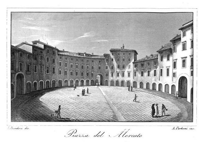 Ab 1830 gestaltete Lorenzo Nottolini den Platz um. Am 1. Oktober 1839 fand der erste Markt auf der Piazza del Mercato statt. Der Stahlstich ist signiert: L. Bandoni dip. – A. Parboni inc. (Zeichner und Stecher). Der heutige Name Piazza dell'Anfiteatro stammt aus dem 20. Jahrhundert.